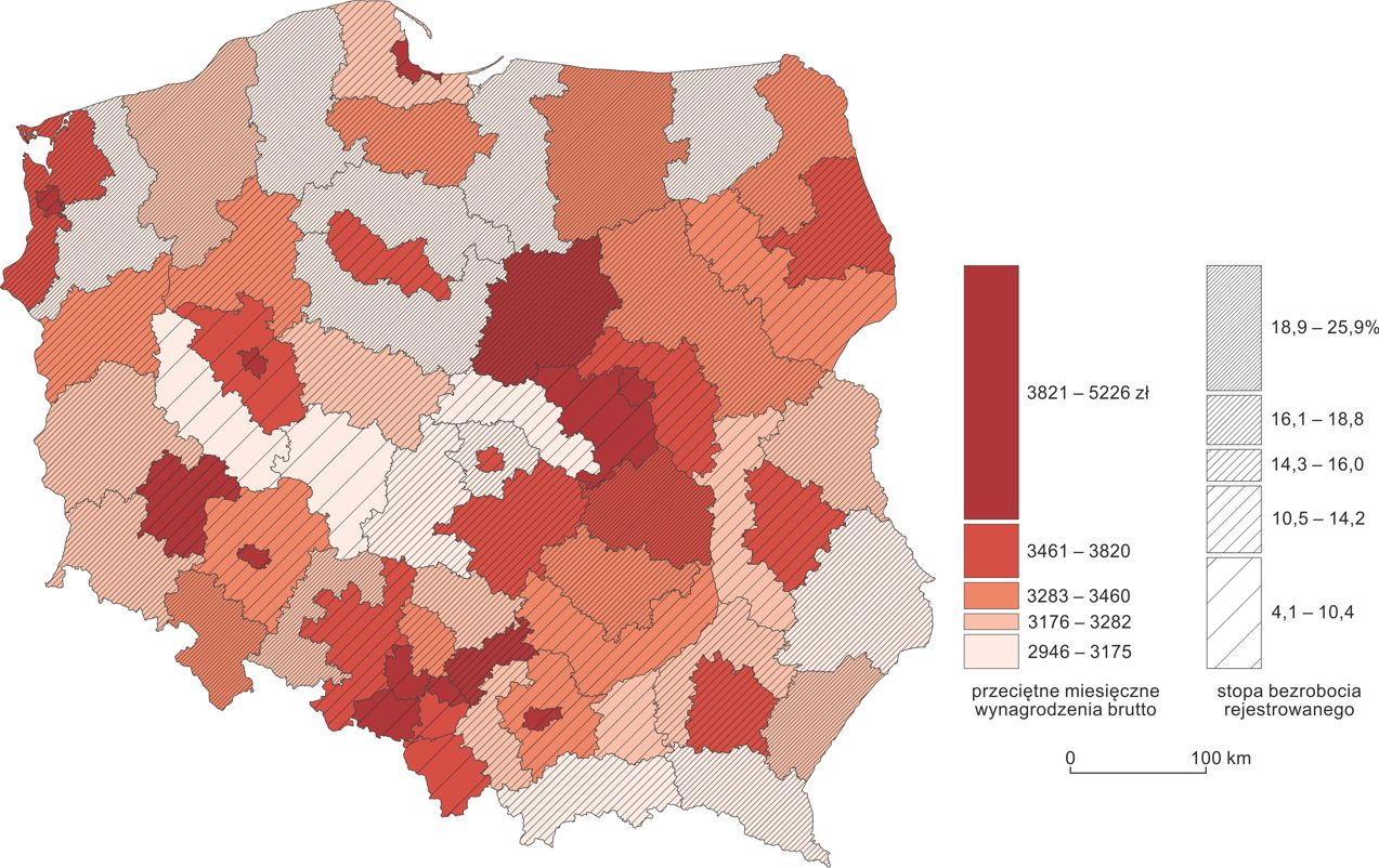 Kartogram złożony: przykład kartogramu powstałego poprzez nałożenie na kartogram ze skalą barwną kartogramu ze skalą deseniową – przeciętne miesięczne wynagrodzenia brutto i stopa bezrobocia rejestrowanego w podregionach w 2013 roku